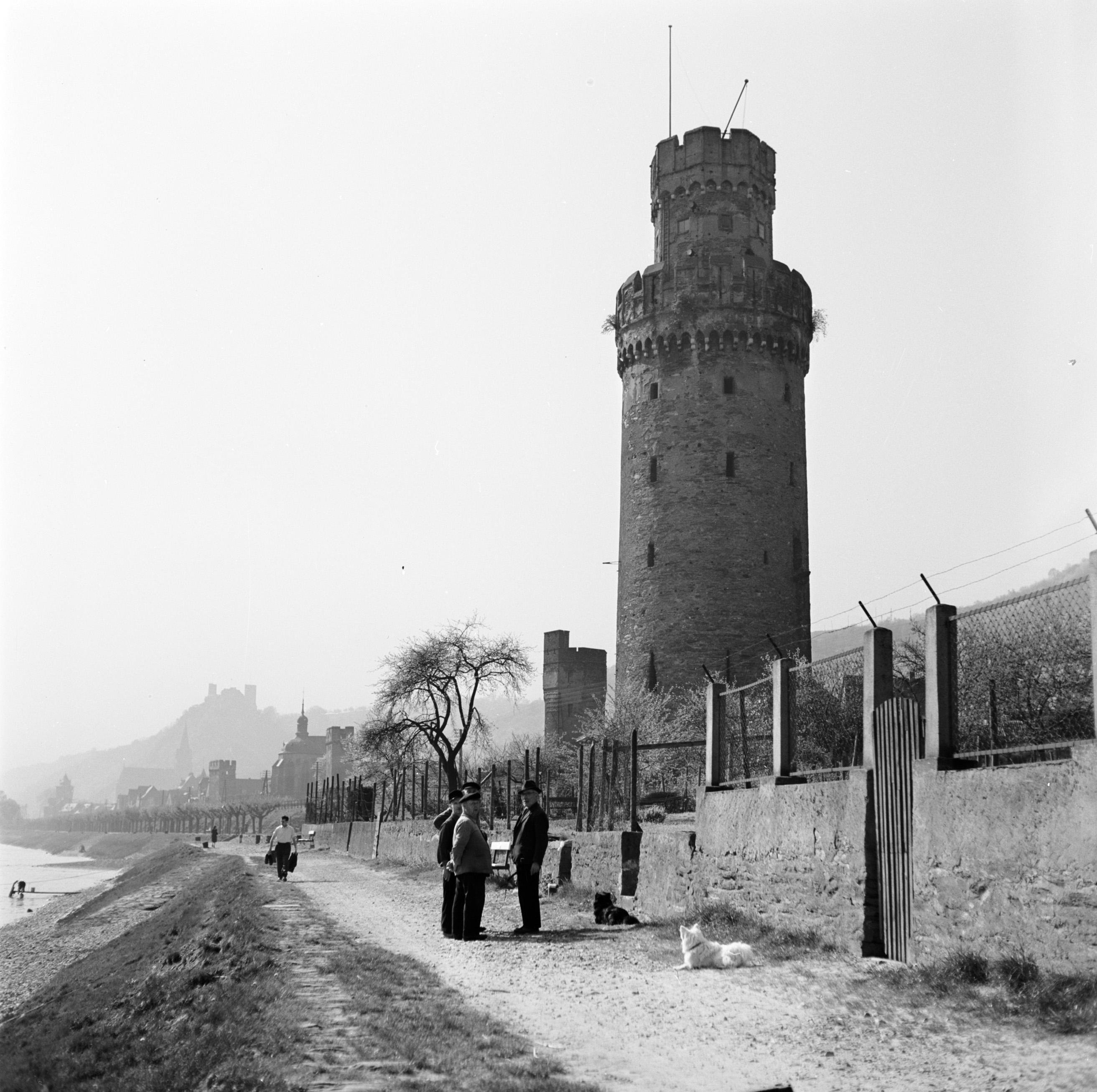 Collectie / Archief : Fotocollectie Van de Poll Reportage / Serie : Rijnvaart, reportage vanaf sleepboot Damco 9: West-Duitsland Beschrijving : Ochsenturm,één van de torens van de middeleeuwse stadsmuur van Oberwesel Datum : 1 april 1955 Locatie : Duitsland, Oberwesel, West-Duitsland Trefwoorden : straatbeelden, torens Fotograaf : Poll, Willem van de Auteursrechthebbende : Nationaal Archief Materiaalsoort : Negatief (6x6) Nummer archiefinventaris : bekijk toegang 2.24.14.02 Bestanddeelnummer : 254-1138